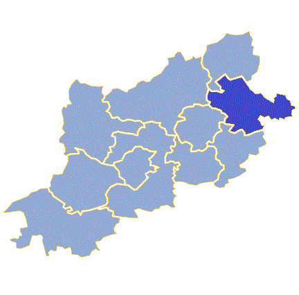 Powiat zielonogórski - Gmina Kargowa